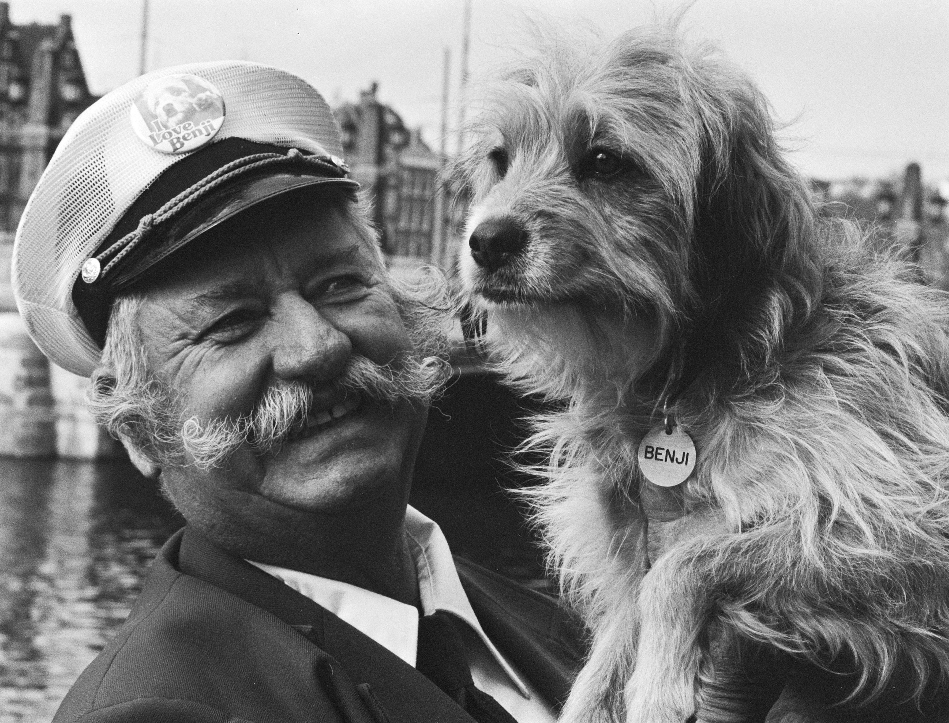 Persconferentie met filmhond Benji in het Amstelhotel te Amsterdam. Benji en trainer Frank Inn